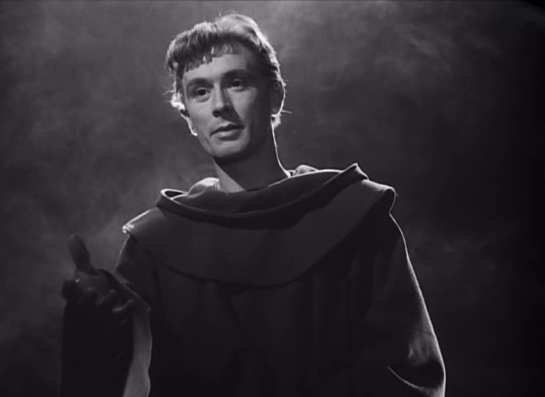 Scena del film Antonio di Padova (1949)